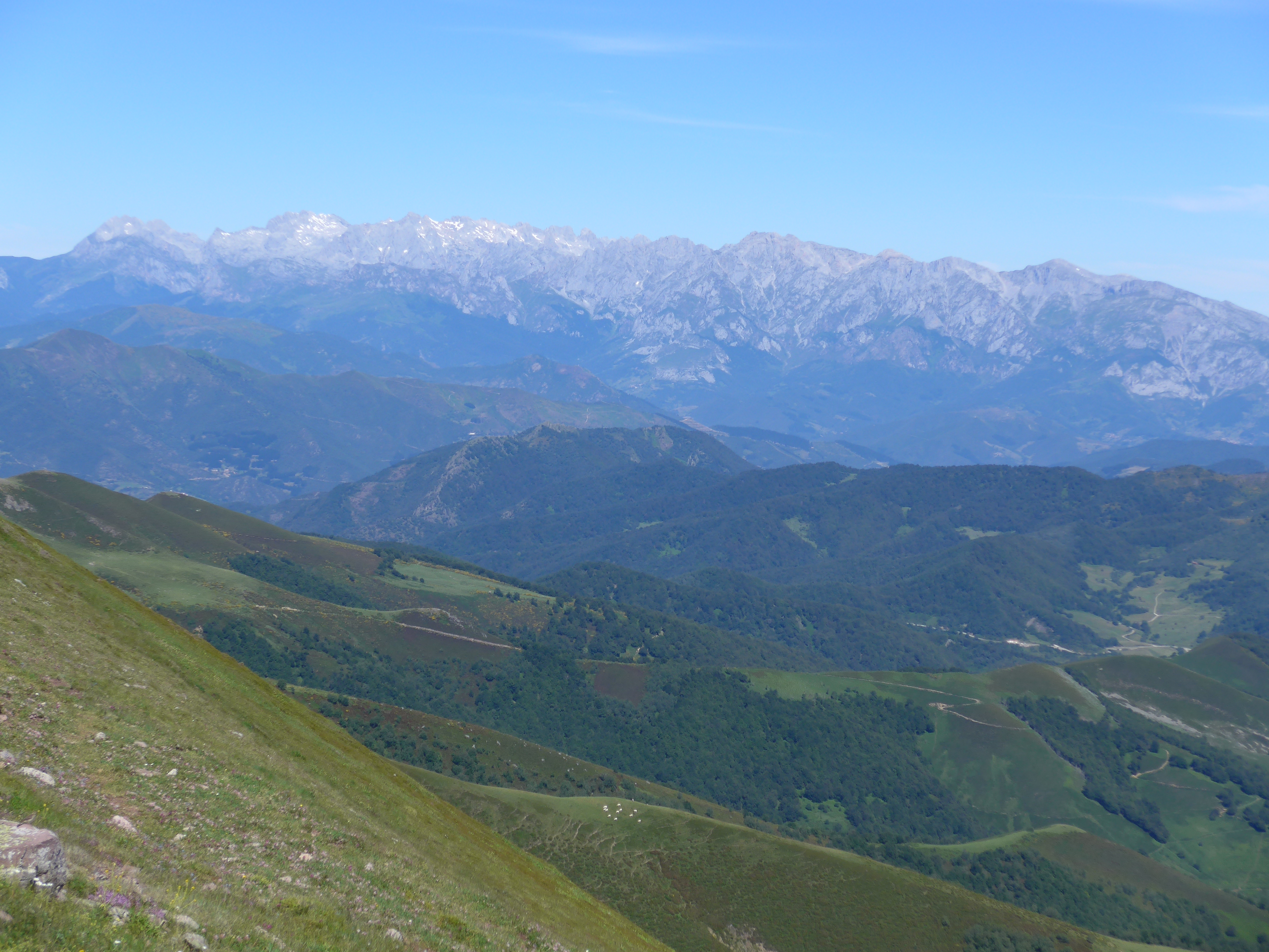 La Fuente del Chivo es un mirador excepcional de los macizos oriental y central de Picos de Europa, de la sierra de Peña Sagra, del valle de Polaciones y del mar Cantábrico.